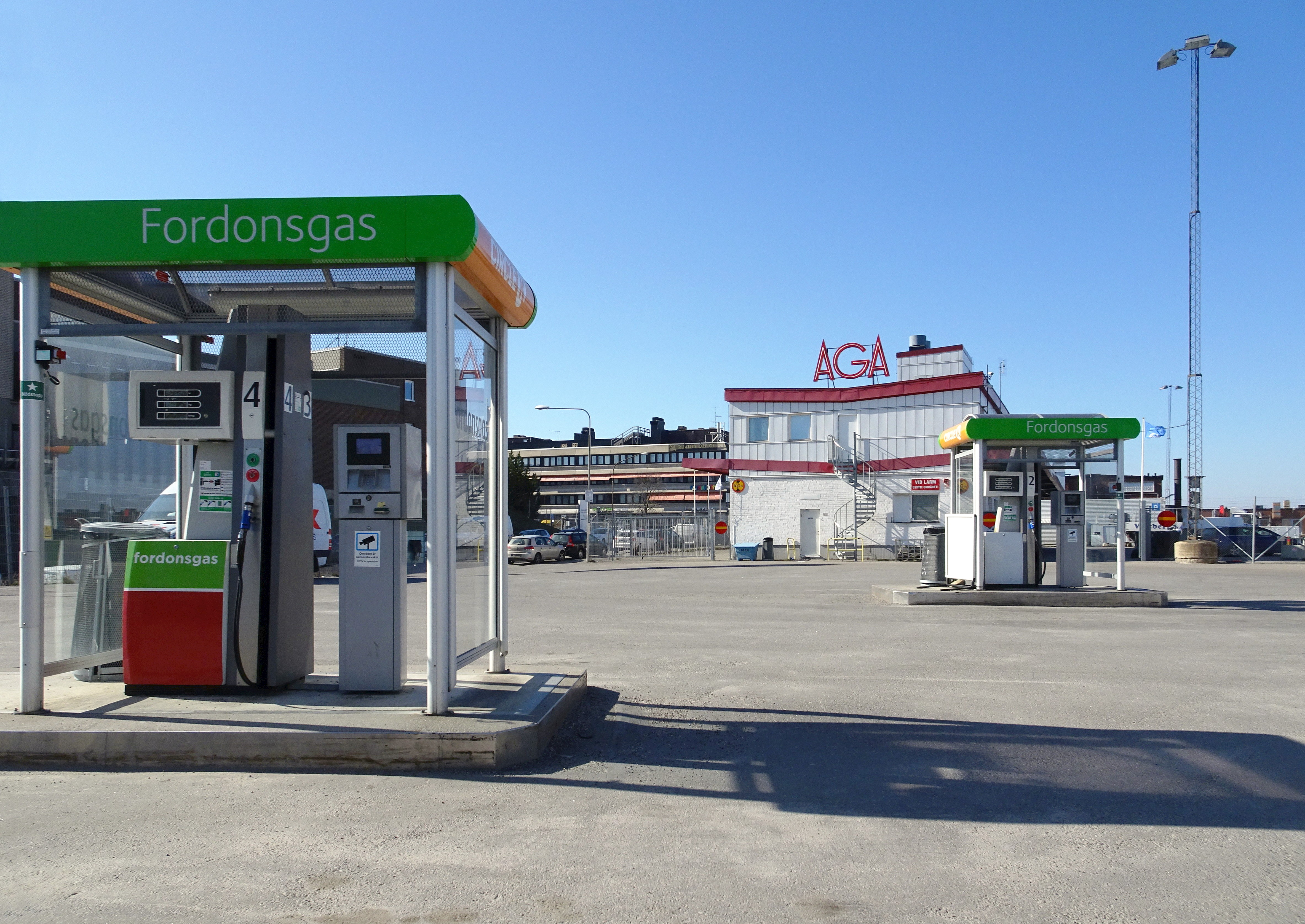 Älvsjö industriområde, Södra Stockholm, AGA fordonsgas, Varuvägen 2-10